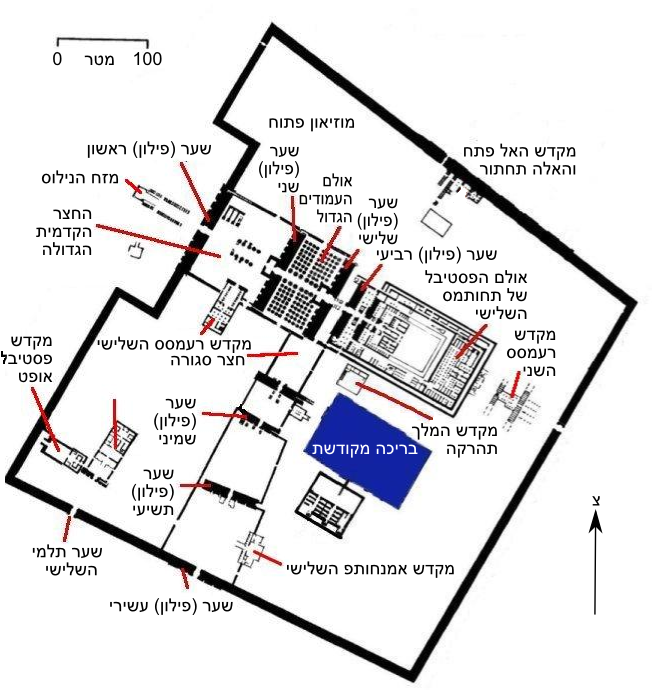 karnak